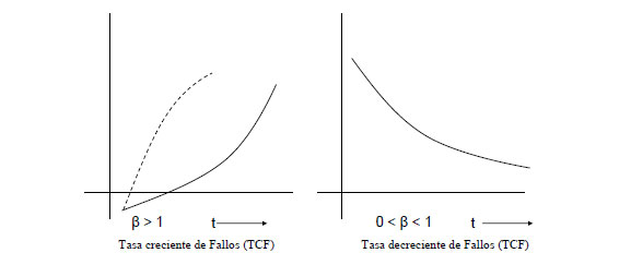 Tasa de crecimientos para posibles fallos